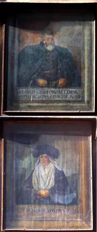 Портрети Георга і Ядвіґи Боїмів: фрескові портрети XVII ст.